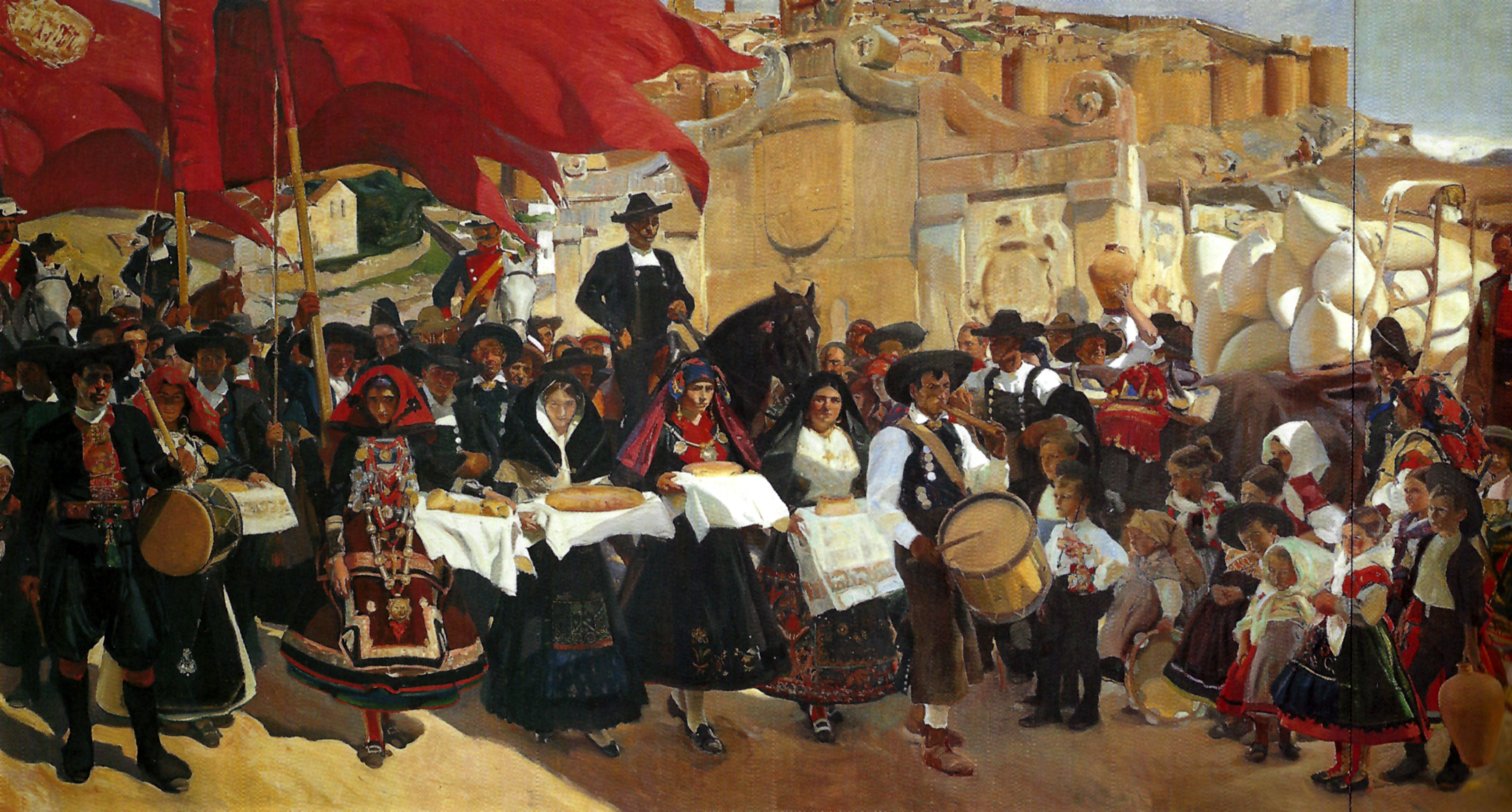 Castilla, la fiesta del pan, mitad izquierda de la obra.